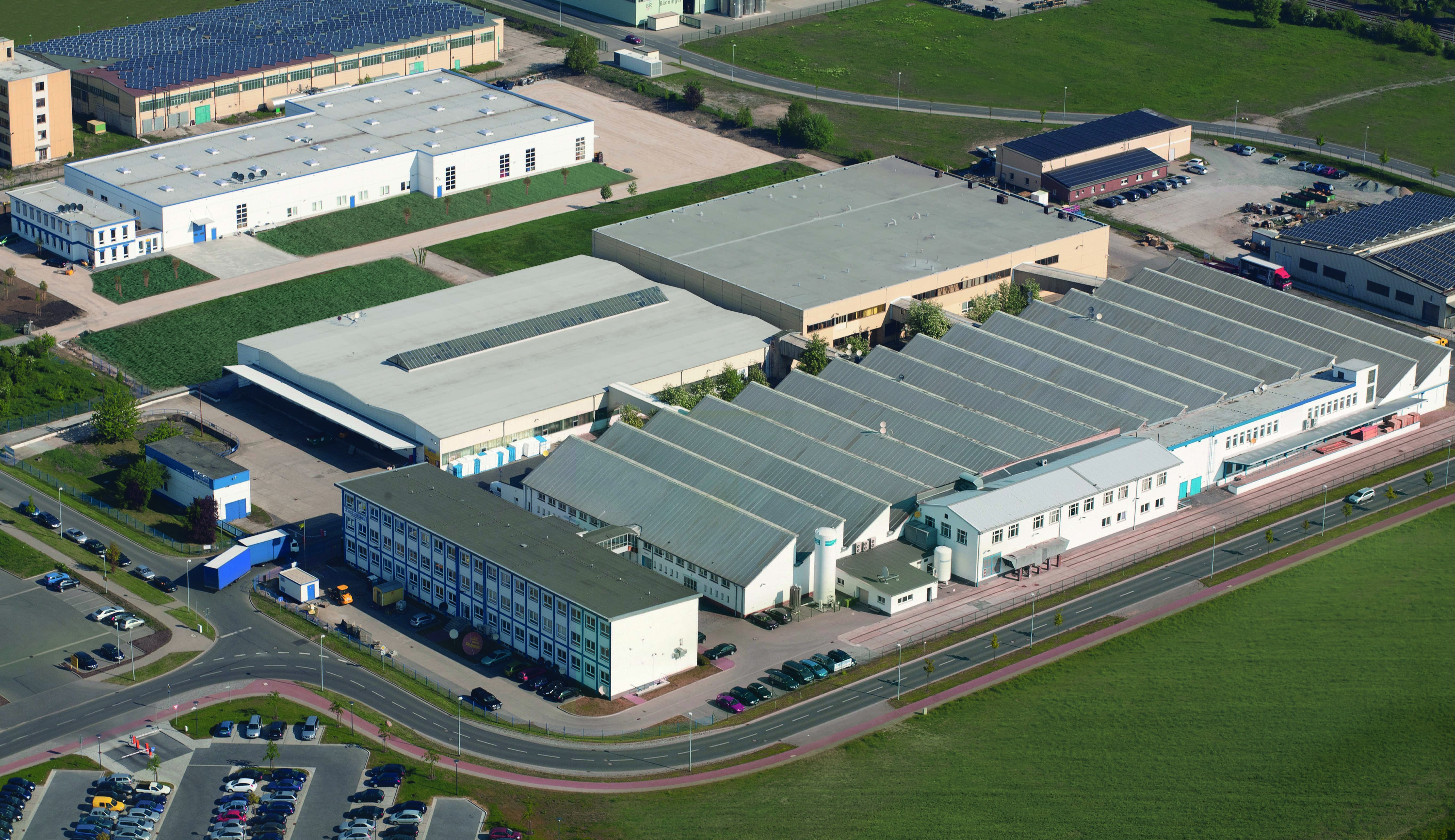 TechniSat-Niederlassung in Stassfurt